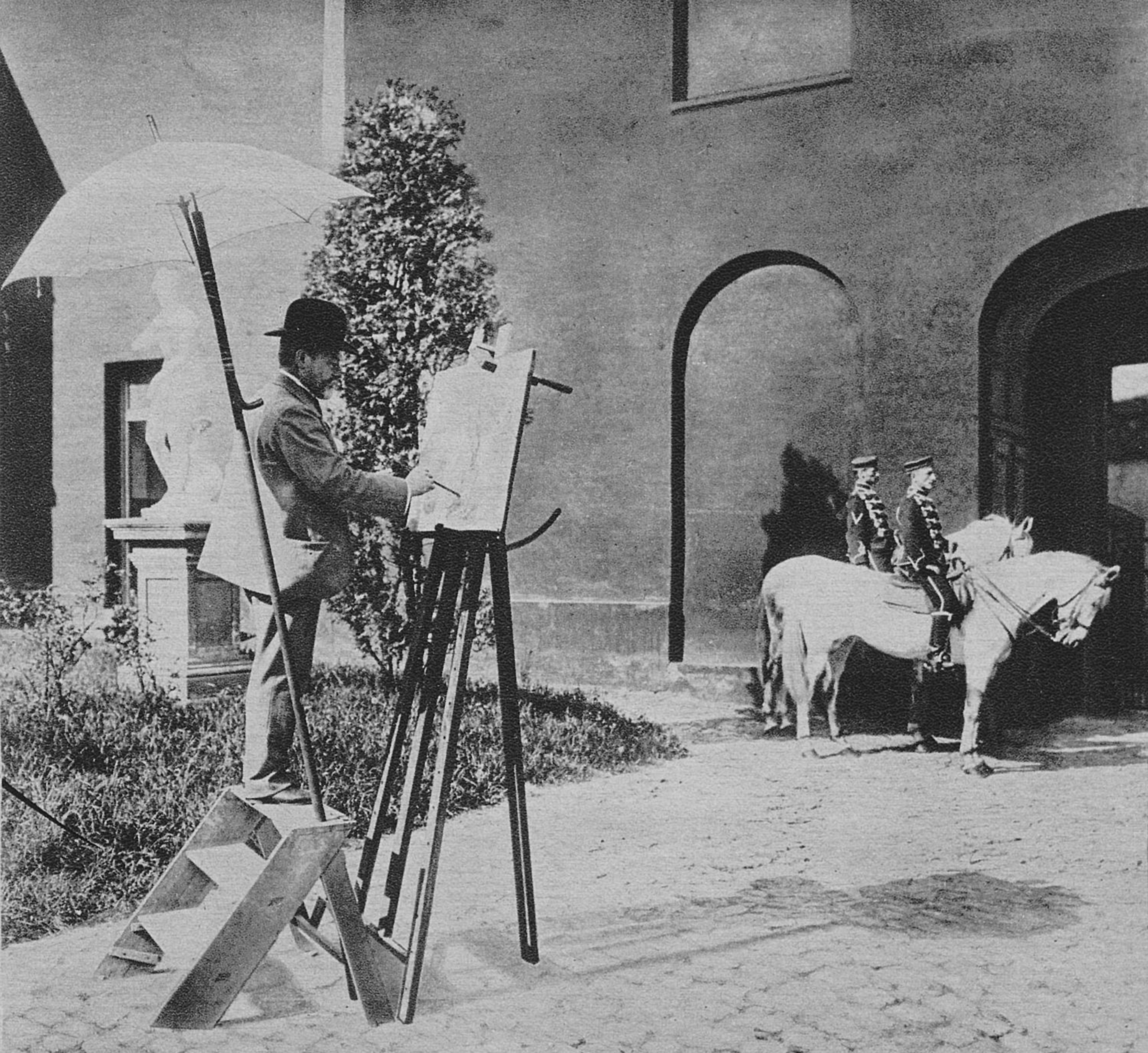 Professor Hermann Knackfuß, der berühmte Kasseler Maler † . Foto Gebr. Haeckel, Berlin Professor Knackfuß wurde in Wissen a. d. Sieg am 11. August 1848 geboren und studierte in Düsseldorf unter Bendemann und Ed. von Gebhardt. Seit 1880 war er Professor an der Akademie, seit 1890 Lehrer der Kunstgeschichte in Kassel, wo er jetzt gestorben ist. Eine große Anzahl öffentlicher Bauten in Deutschland wurden durch ihn mit Wand- und Deckengemälden, vornehmlich Vorgänge aus der deutschen Geschichte darstellend, geschmückt. Knackfuß war auch als Kunstschriftsteller und als Illustrator sehr geschätzt.